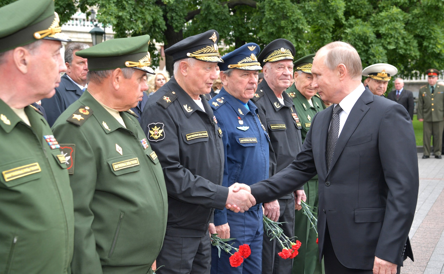 Возложение венка к Могиле Неизвестного Солдата.